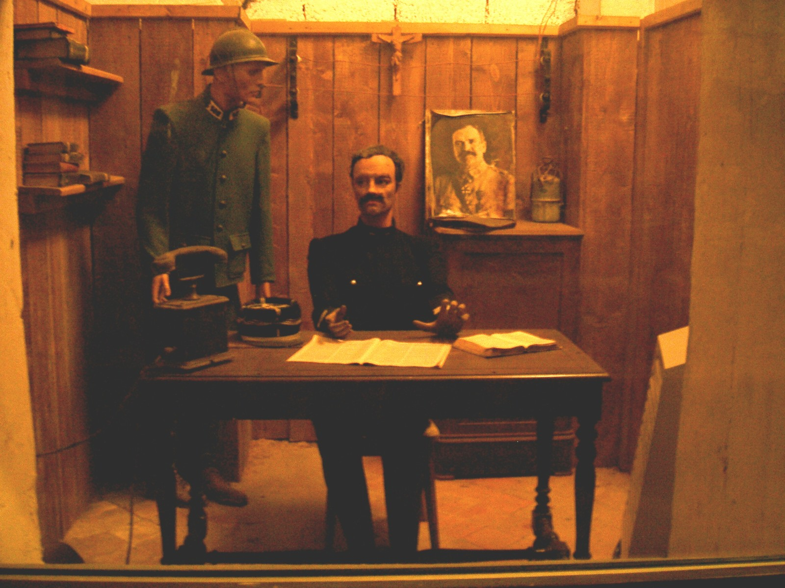 souvenir du Commandant Raynal au fort de Vaux - Verdun 1916 self made PRA